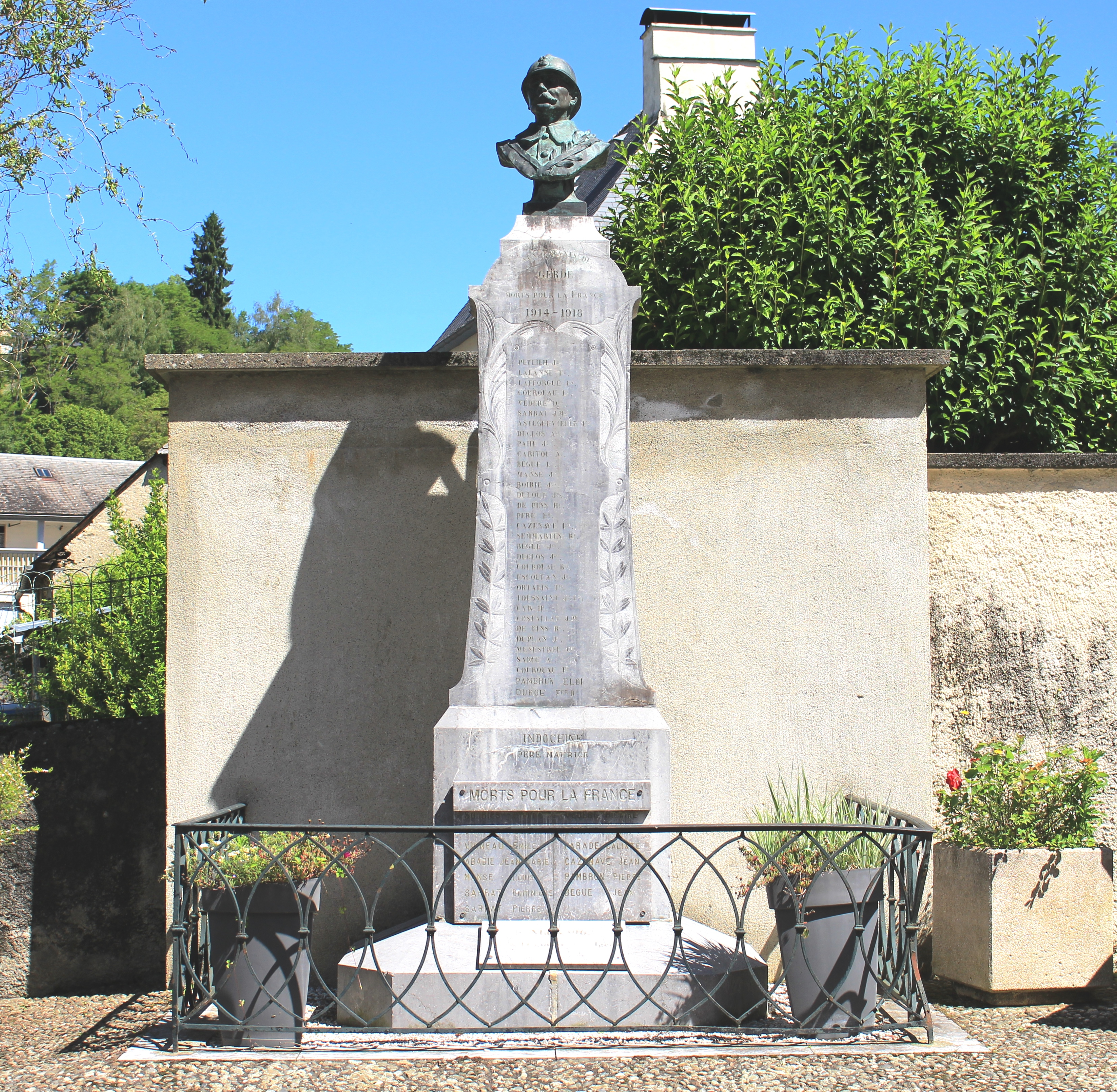 Monument aux morts de Gerde (Hautes-Pyrénées)